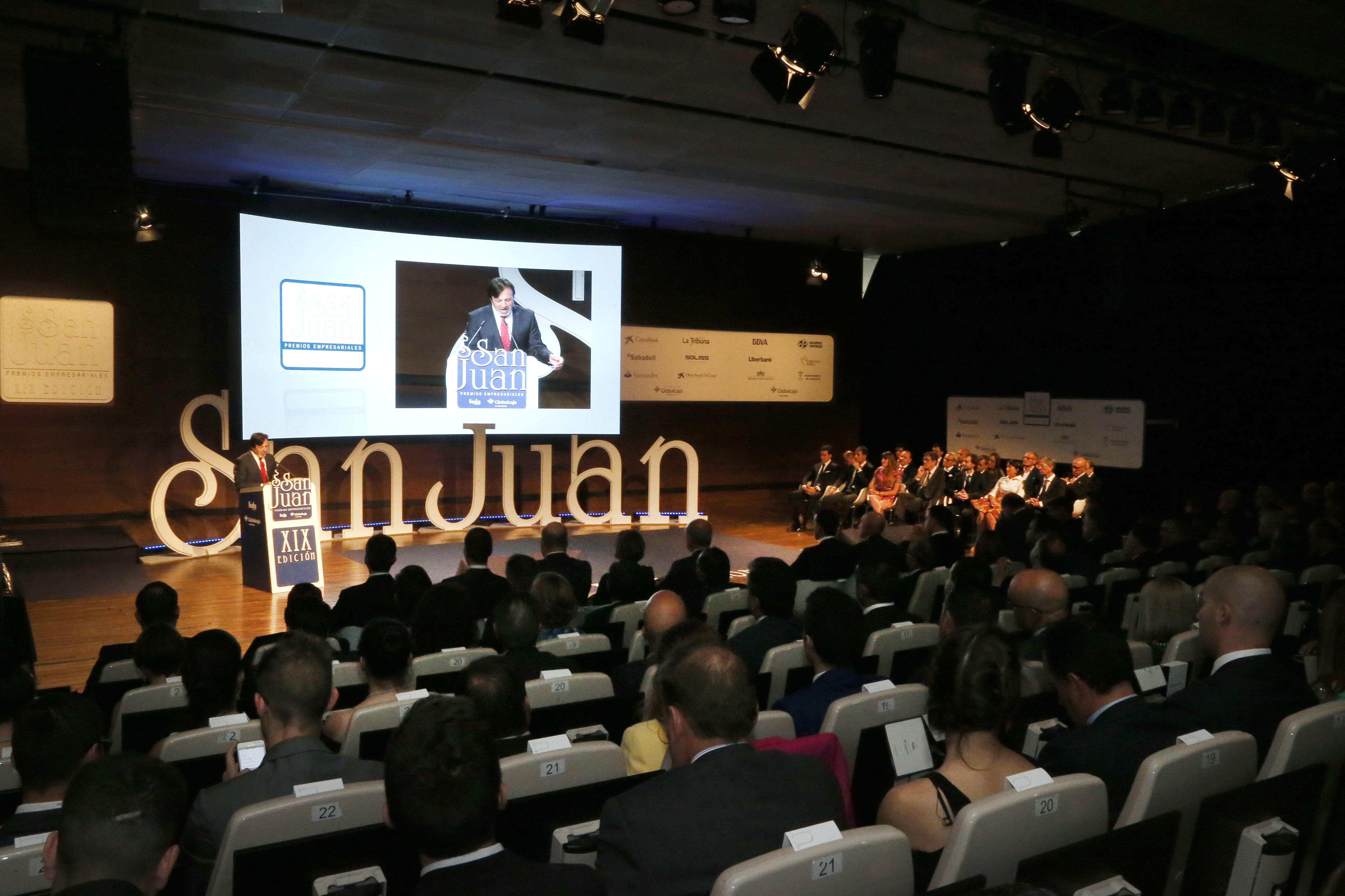 Gala de entrega de los Premios Empresariales San Juan’2018-XIX Edición, en el Palacios de Congresos “Ciudad de Albacete”.